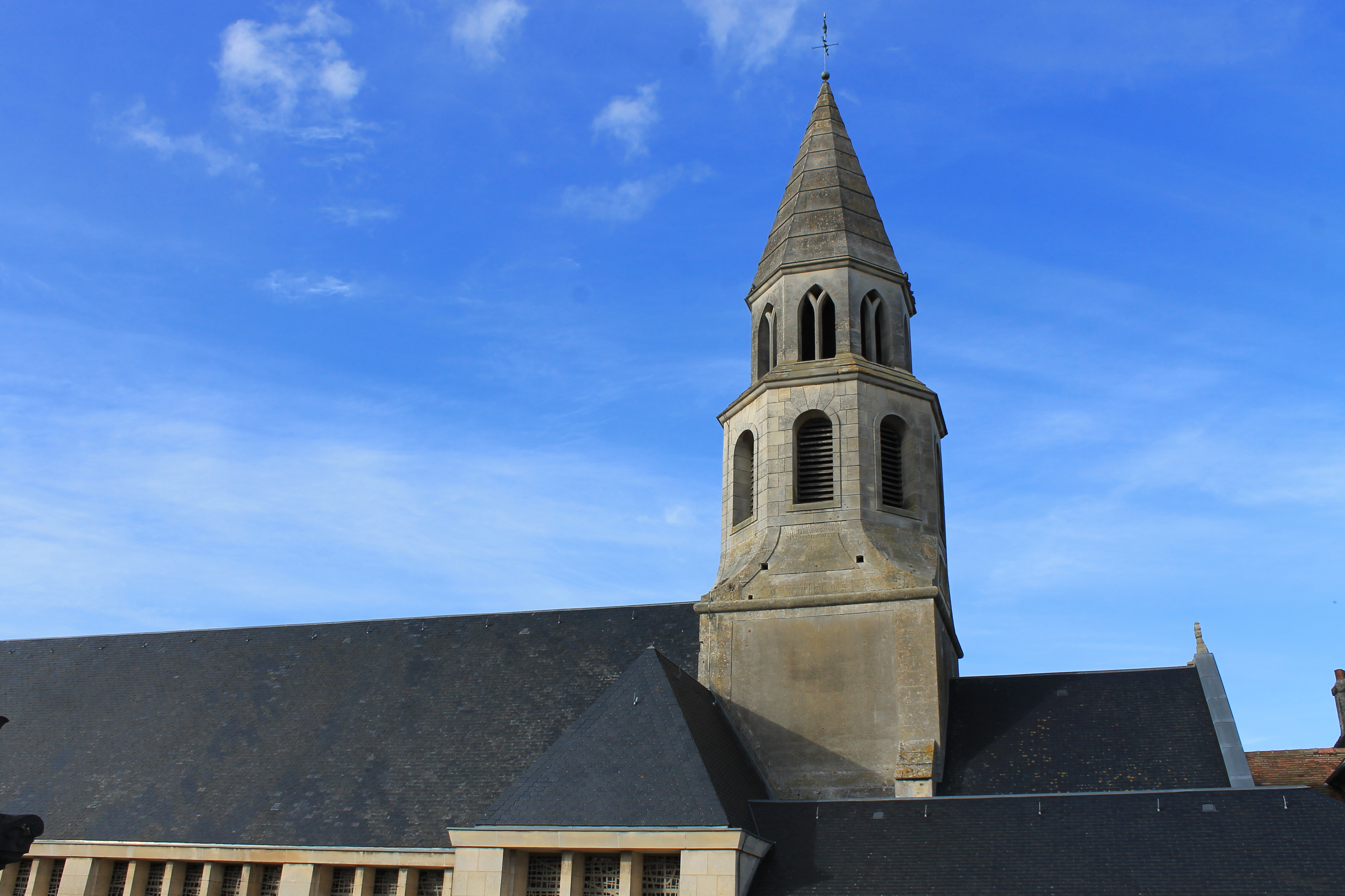 Église Saint-Germain à Saint-Germain-la-Blanche-Herbe (Calvados)